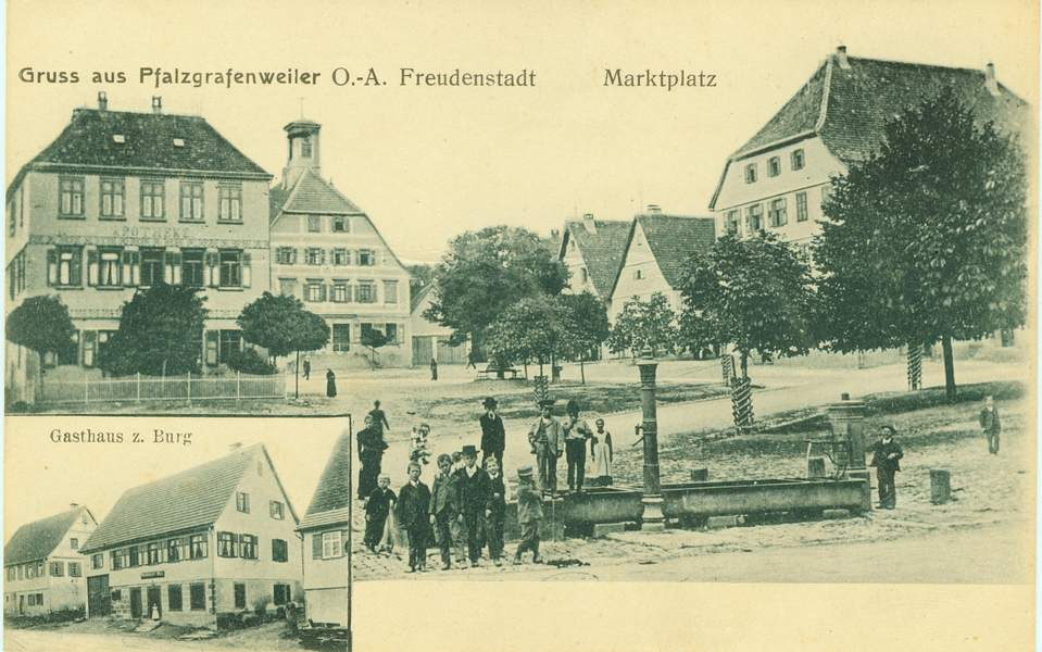 Alte Postkarte ca. 1910 Marktplatz und Gasthaus Burg Pfalzgrafenweiler